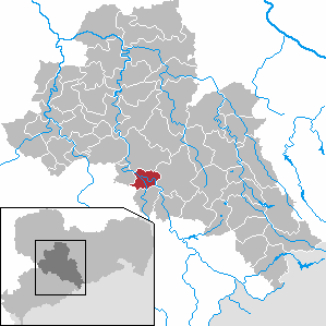 Flöha in Saxony - district Mittelsachsen